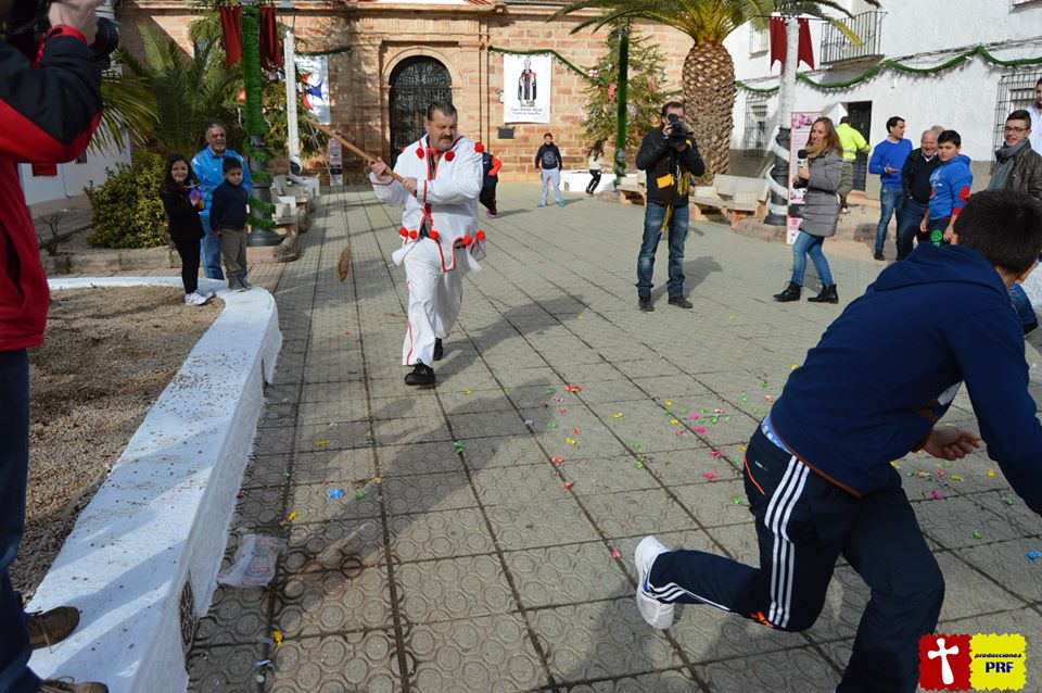 El pelotero de Arquillos al acecho.